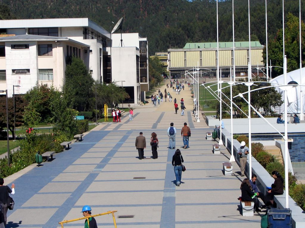 Vista desde el Foro de la Universidad de Concepción